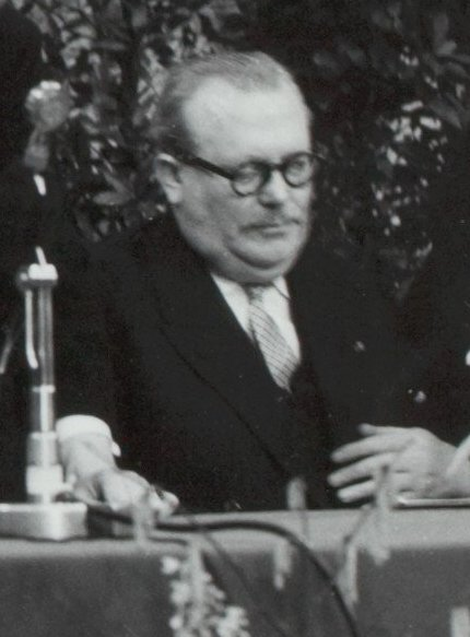 Collectie / Archief : Fotocollectie Rijksvoorlichtingsdienst Eigen Reportage / Serie : [ onbekend ] Beschrijving : Ondertekening Benelux akkoord in de Ridderzaal te Den Haag; Vlnr. Larock (België) (niet zichtbaar), J. Bech (Luxemburg), dr. W. Drees, A. van Acker (België) en Luns Datum : 3 februari 1958 Locatie : Den Haag, Zuid-Holland Trefwoorden : akkoorden, conferenties, internationale organisaties, ministers, politici Fotograaf : Fotograaf Onbekend / Anefo Auteursrechthebbende : Nationaal Archief Materiaalsoort : Foto (zwart/wit) Nummer archiefinventaris : bekijk toegang 2.24.10.02 Bestanddeelnummer : 121-0409